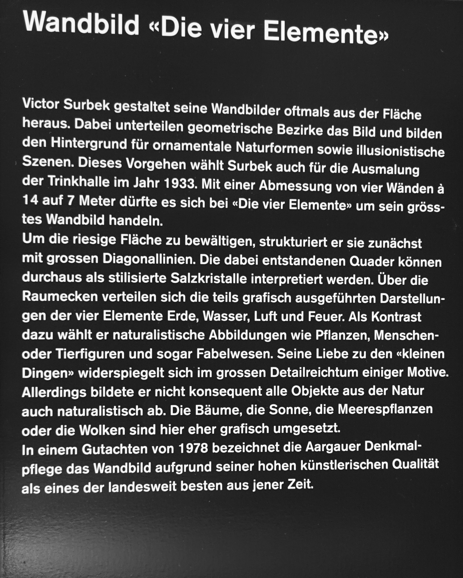 Für die Trinkbrunnenhalle der Kurbrunnenanlage in Rheinfelden schuf Victor Surbek 1933 das Wandgemälde Die vier Jahreszeiten